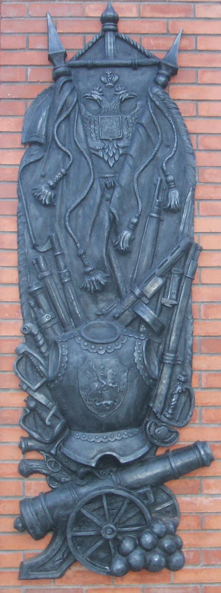 Сестрорецк СПб Памятник последнему рабочему завода СИЗ. Правая стела